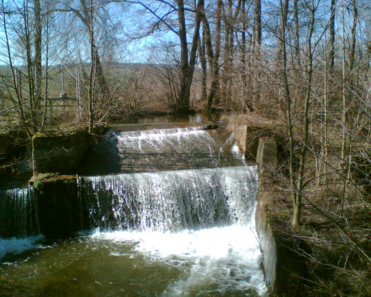 Mírovka nad Mohelnicí